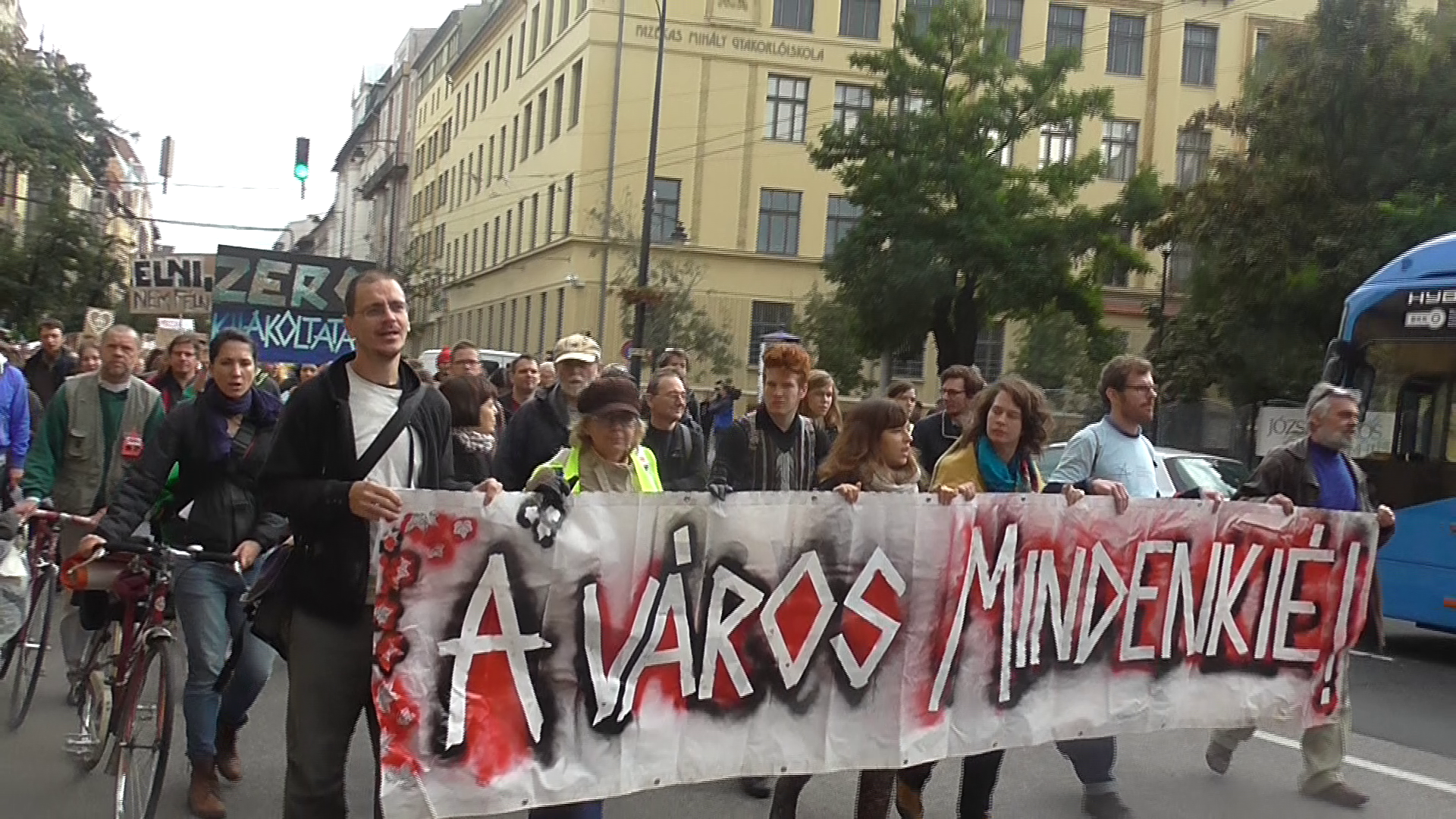 A Város Mindenkié Üres Lakások Menete